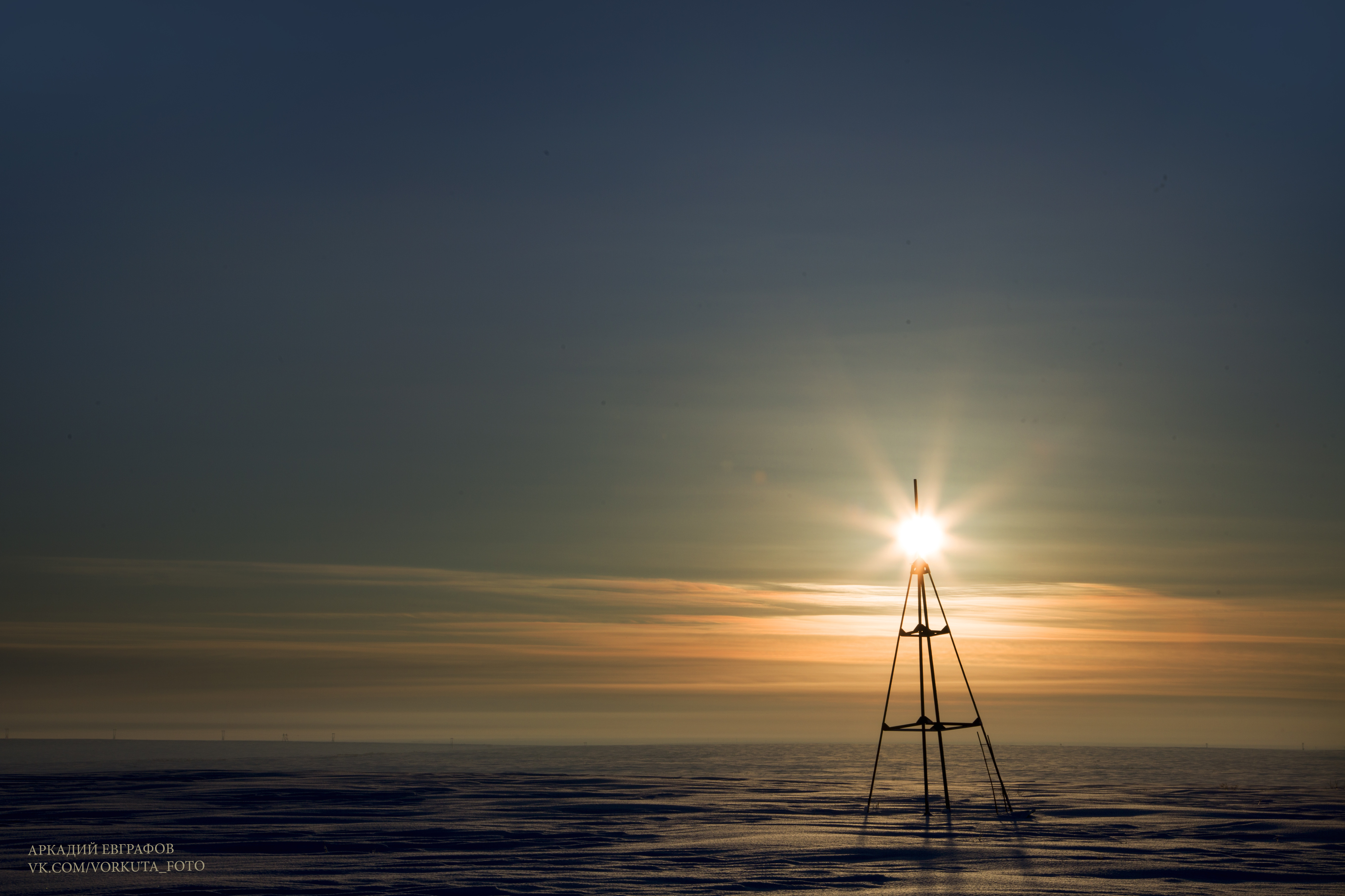 По тундре люди ставят на такие сооружения - тур, для ориентирования. Их ставят так, чтобы от одной была видна другая.